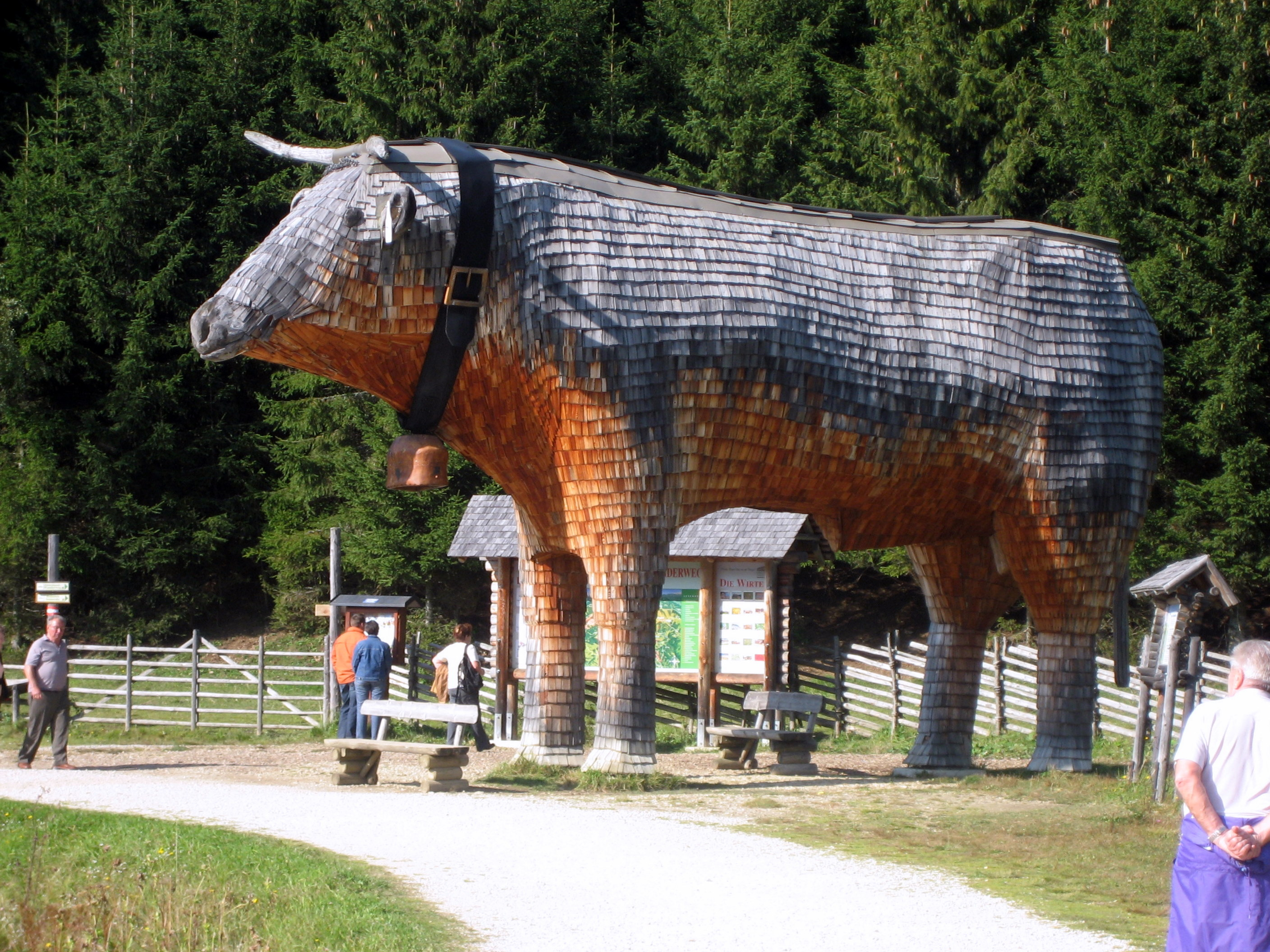 Almochse am Teichalm-See im Naturpark Almenland